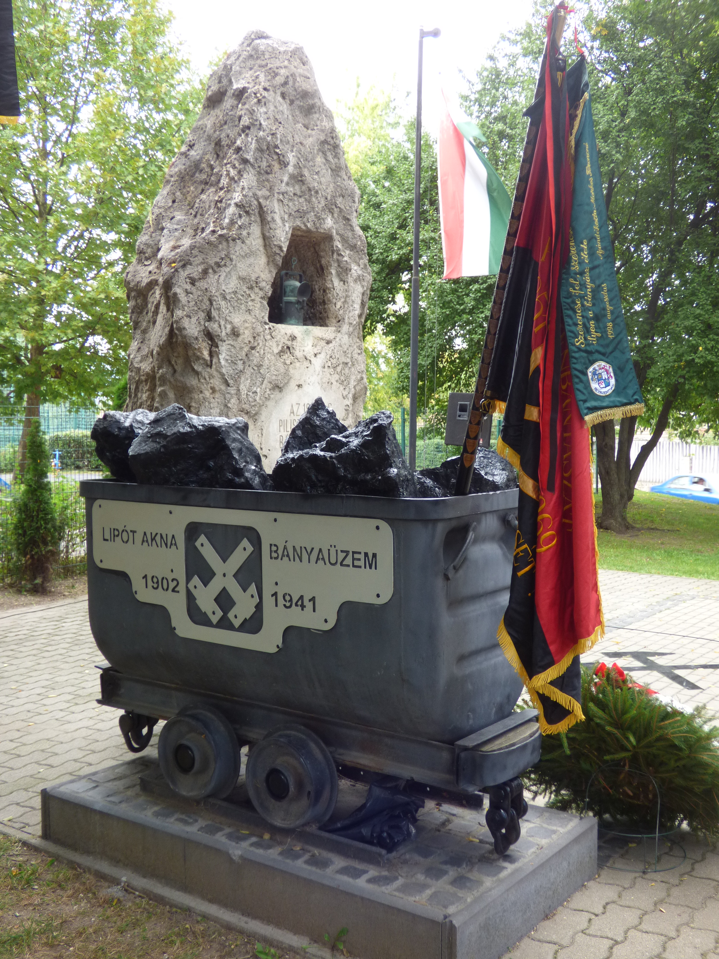 Pilisvörösvár bányász emlékparkja (2016). Az egykori bányatelep központjában 2010-ben létesült a Bányász emlékpark. Ekkor helyezték át ide Bajnok Béla szobrászművésznek az 1928-as pilisvörösvári bányászsztrájk 50. évfordulója emlékére 1978-ban készült emlékművet. - Rákóczi utca